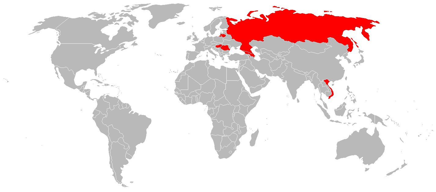 Description Các quốc gia sử dụng Yak-52 Date2-1-2012SourceTôi tạo ra dựa trên image:BlankMap-World.png.AuthorThành viên:VuhoangsonhnPermission (Reusing this file) Các quốc gia sử dụng Yak-52